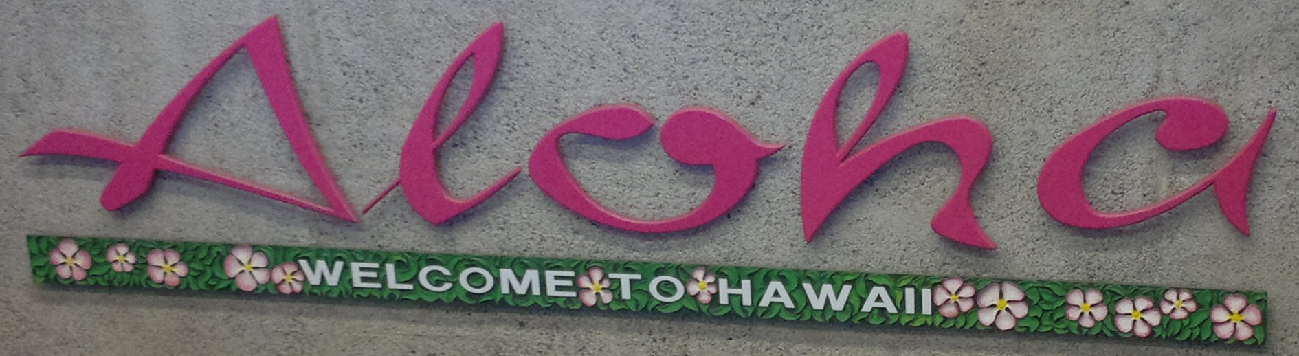 Dieses Schild begrüßt alle ankommenden Gäste auf dem Flughafen Honolulus.